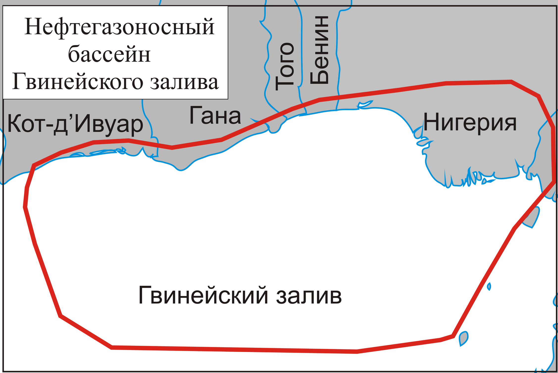 Карта НГБ Гвинейского залива